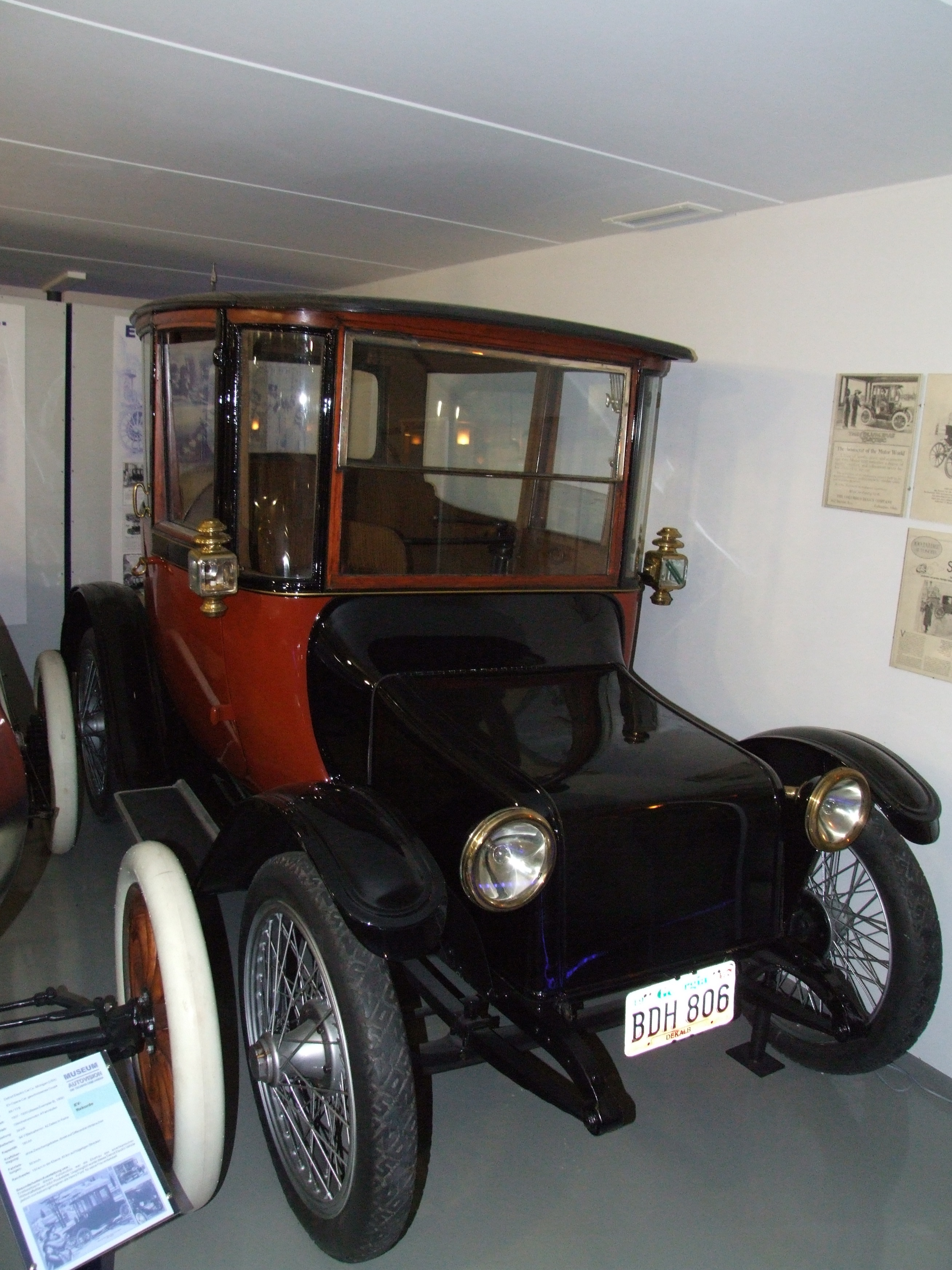 EV-Opera-Car, Modell 68/17 B, Detroit Electric Car Co., Michigan (USA), Baujahr 1909, Bauzeit 1907-1930, 55 km/h, Gleichstrommotor 4 Fahrstufen, 39 kW, Bleibatterie: 94 Volt, Kapazität: 180 AH, 42 Zellen in Reihe, Kraftübertragung direkt auf Hinterachse ; ehemaliger Wagen der Ehefrau von John Rockefeller; aufgenommen im Museum Autovision, Altlußheim, Deutschland, Informationen von der Schrifttafel dieses Museums